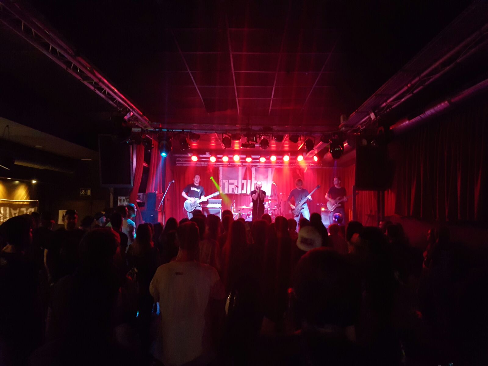 Habitat en el Black Lostus Fest 2016